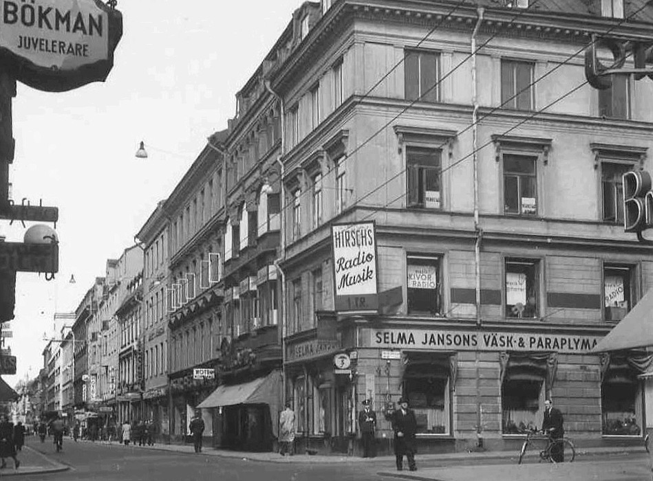 hörnet Drottninggatan, Mäster Samuelsgatan